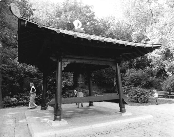 ADN-ZB-Schindler 1.9.89-Berlin: 50.Jahrestag Beginn des 2.Weltkrieges. Die japanische Weltfriedensglocken-Gesellschaft stiftete diese Glocke, die im Volkspark Friedrichshain ihren Platz fand.